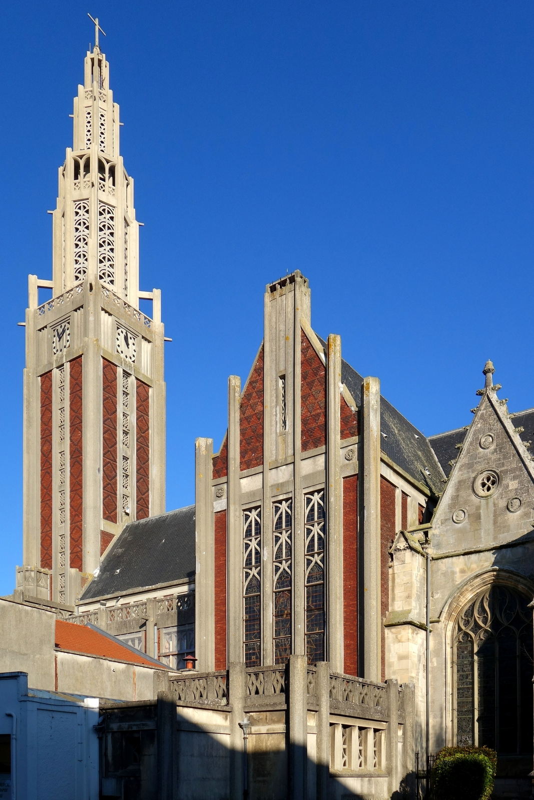 Église Saint-Pierre de Roye